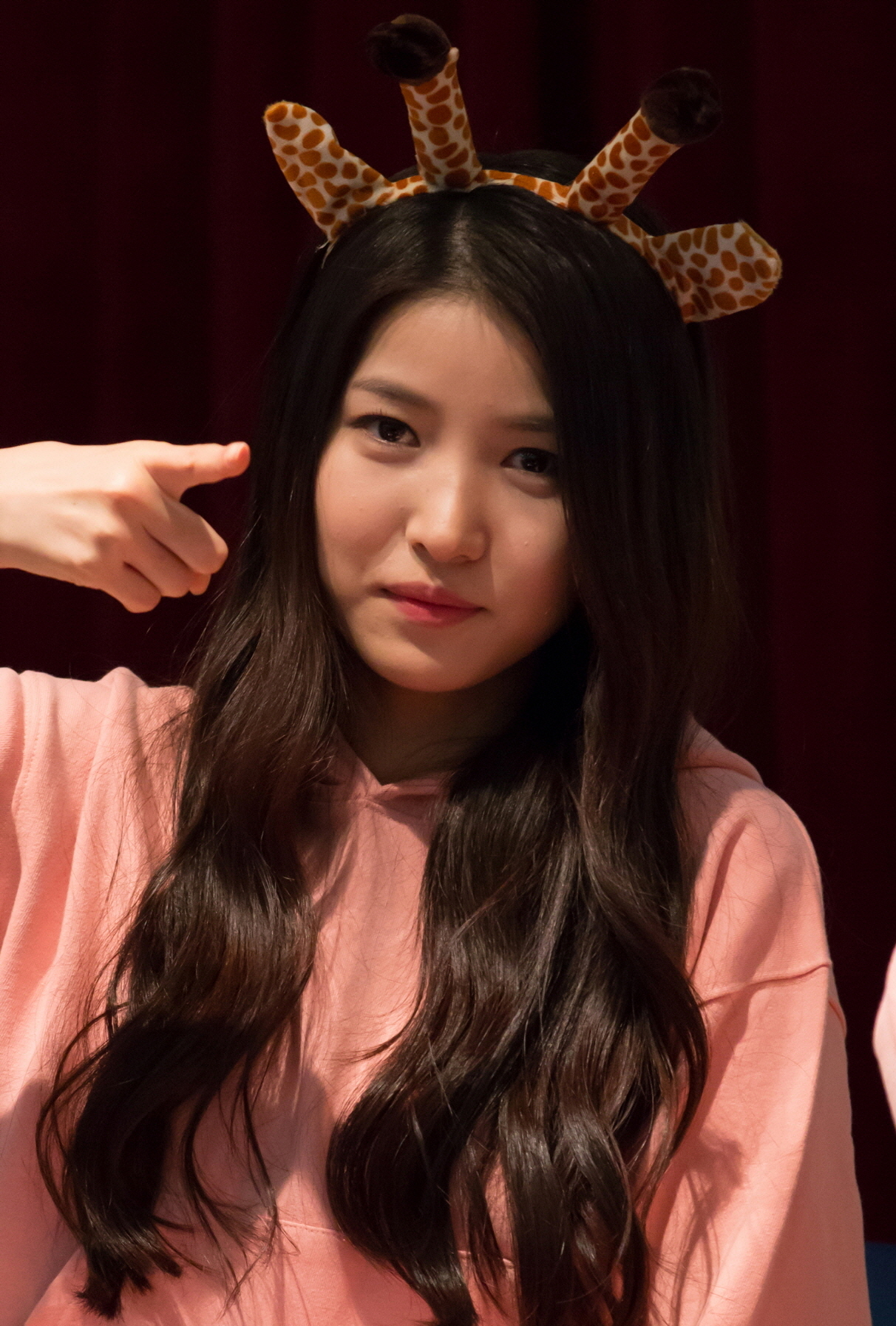 (15.03.08) GFRIEND 여자친구 대전 팬싸인회 직찍 by 포에버